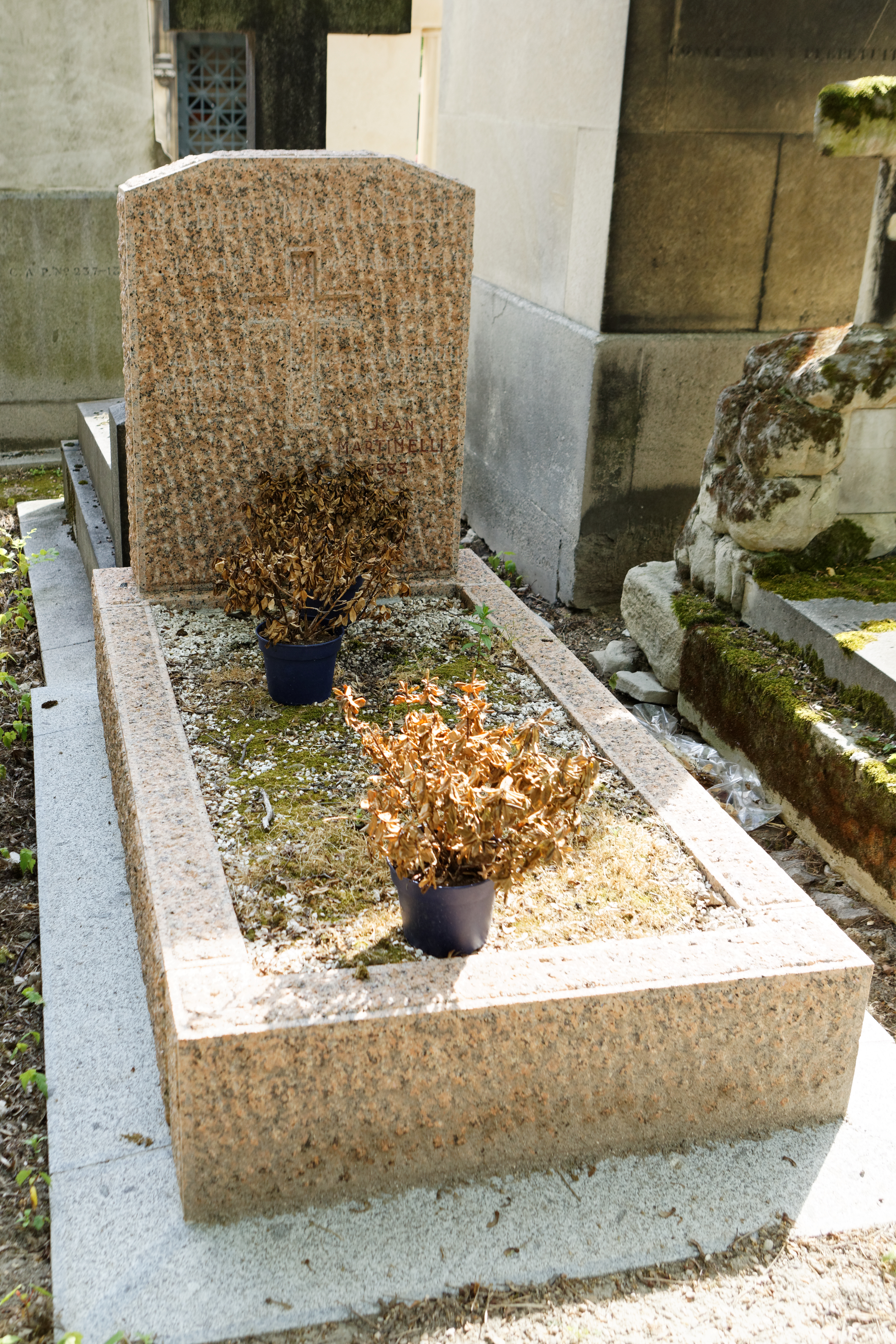 Sépulture de Jean Martinelli, né Jean Siegfried Martinet (1909-1983), acteur français qui doublait régulièrement les acteurs Burt Lancaster et Gary Cooper.